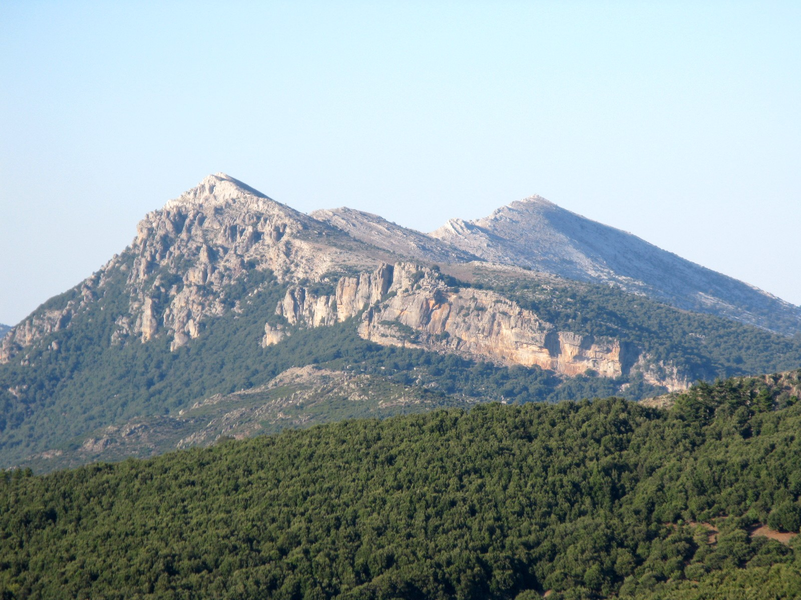 Supramonte di Orgosolo - Punta sa Pruna